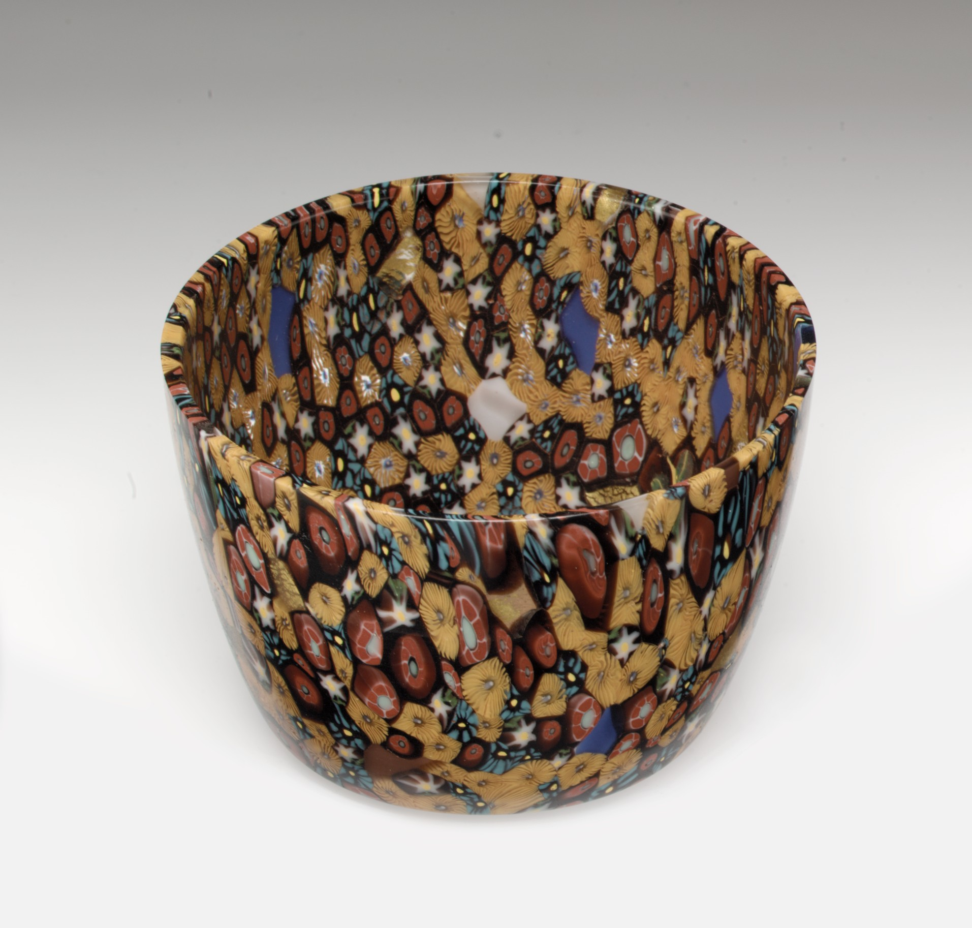 Italian, Venice (Murano); Bowl; Glass